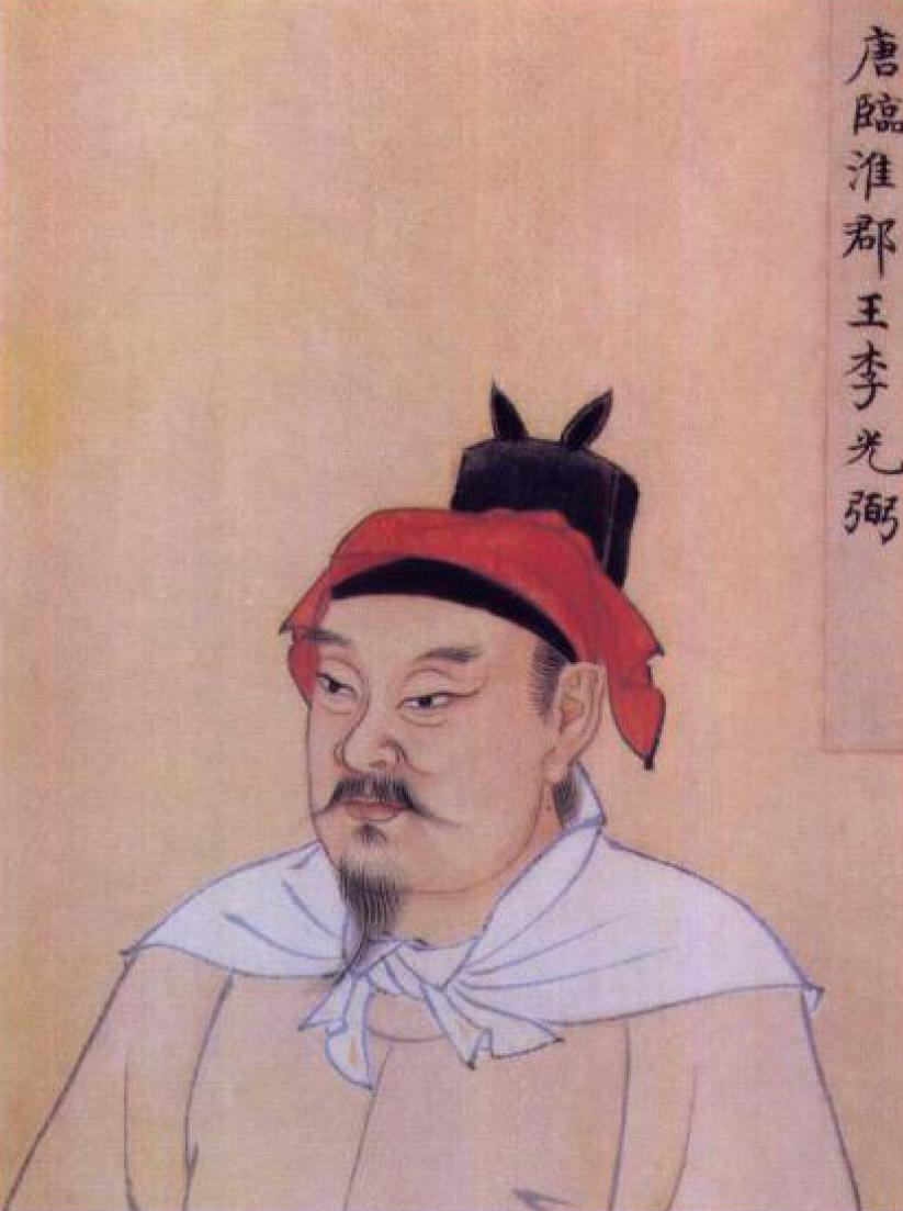 唐临淮郡王李光弼